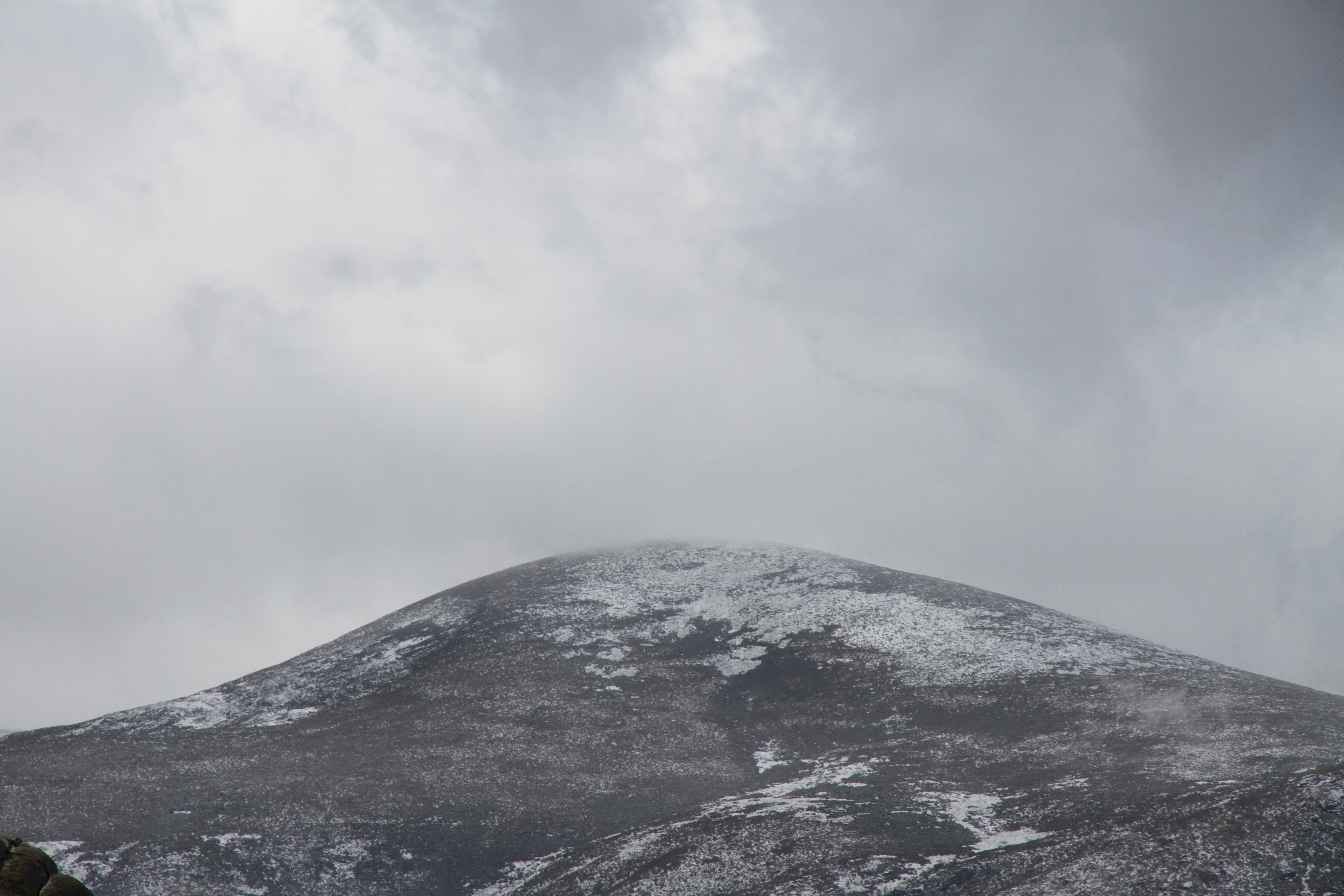 La Serrota vista desde Muñotello